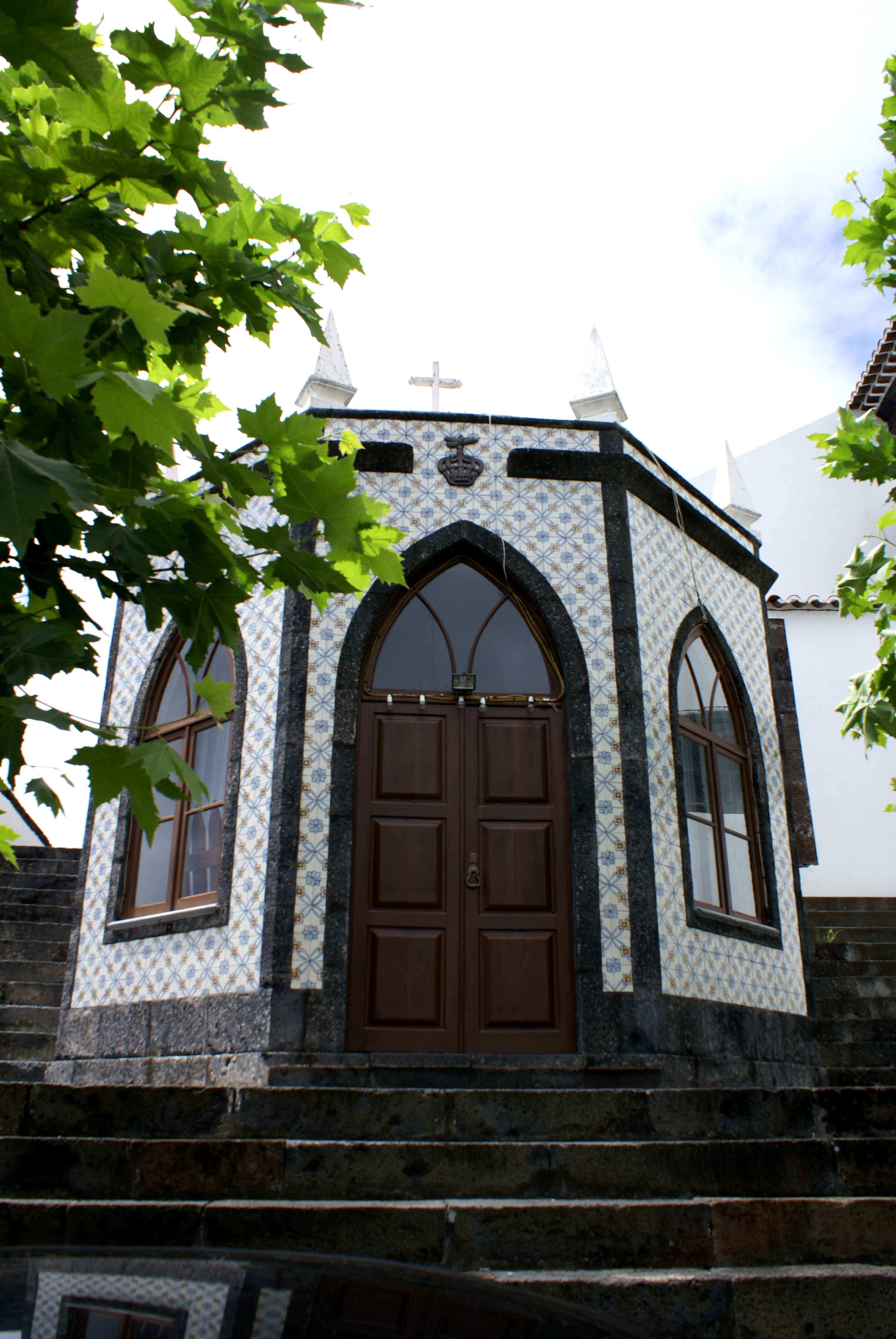 Império do Espírito Santo da Calheta, ilha de São Jorge, Açores